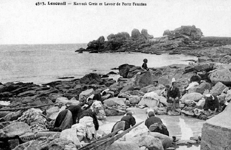 Lesconil : le lavoir de Pors-ar-Feunteun (sur la plage) et les rochers de Karreck Creiz vers 1920. Ce lavoir, ainsi que des lavandières en costume local, a été peint par Paul Grégoire (Lavandières près de la mer au pays bigouden). Il était seulement creusé dans les galets de la page et ne fut doté d'un mur de protection qu'en 1928.